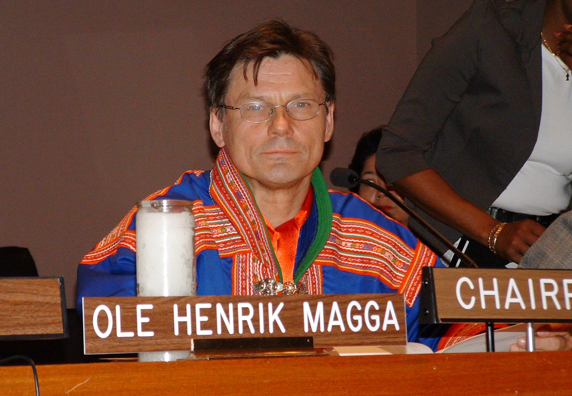 Ole Henrik Magga (NSR) var Sametingets første president. Han var også den første lederen av FN Permanente Forum for urfolkssaker, og er tidligere leder i Norske Samers Riksforbund. Fortsatt stiller han som listekandidat for NSR ved høstens sametingsvalg.